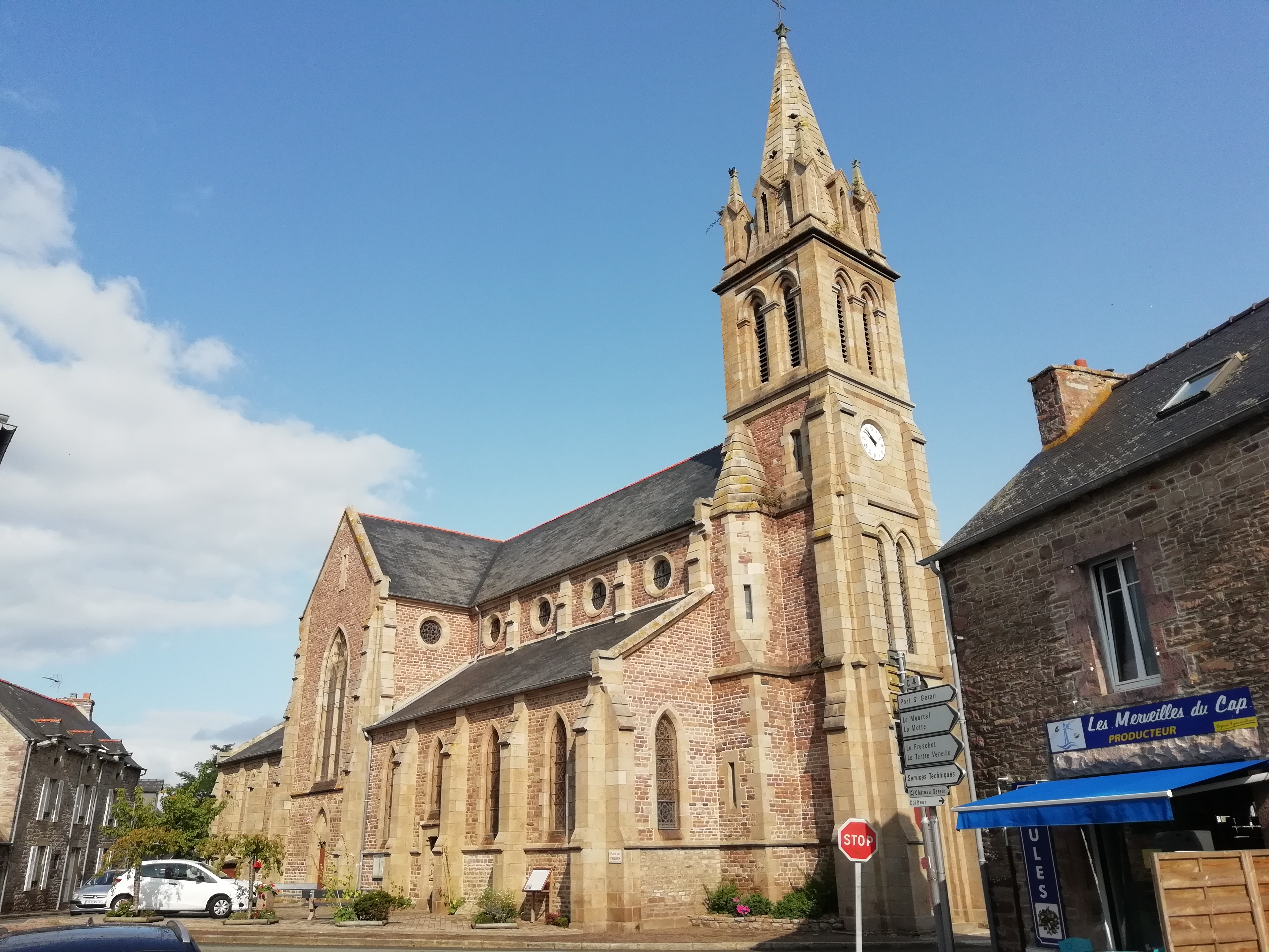 Bretagne